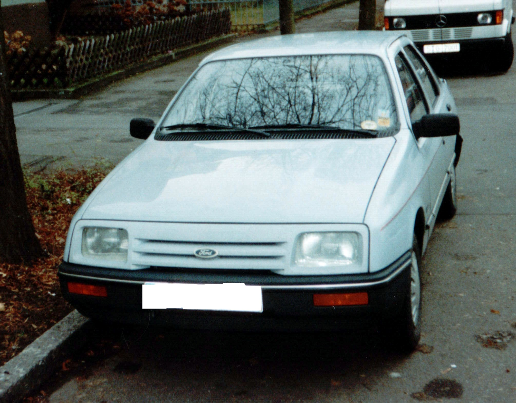 Ford Sierra 1984